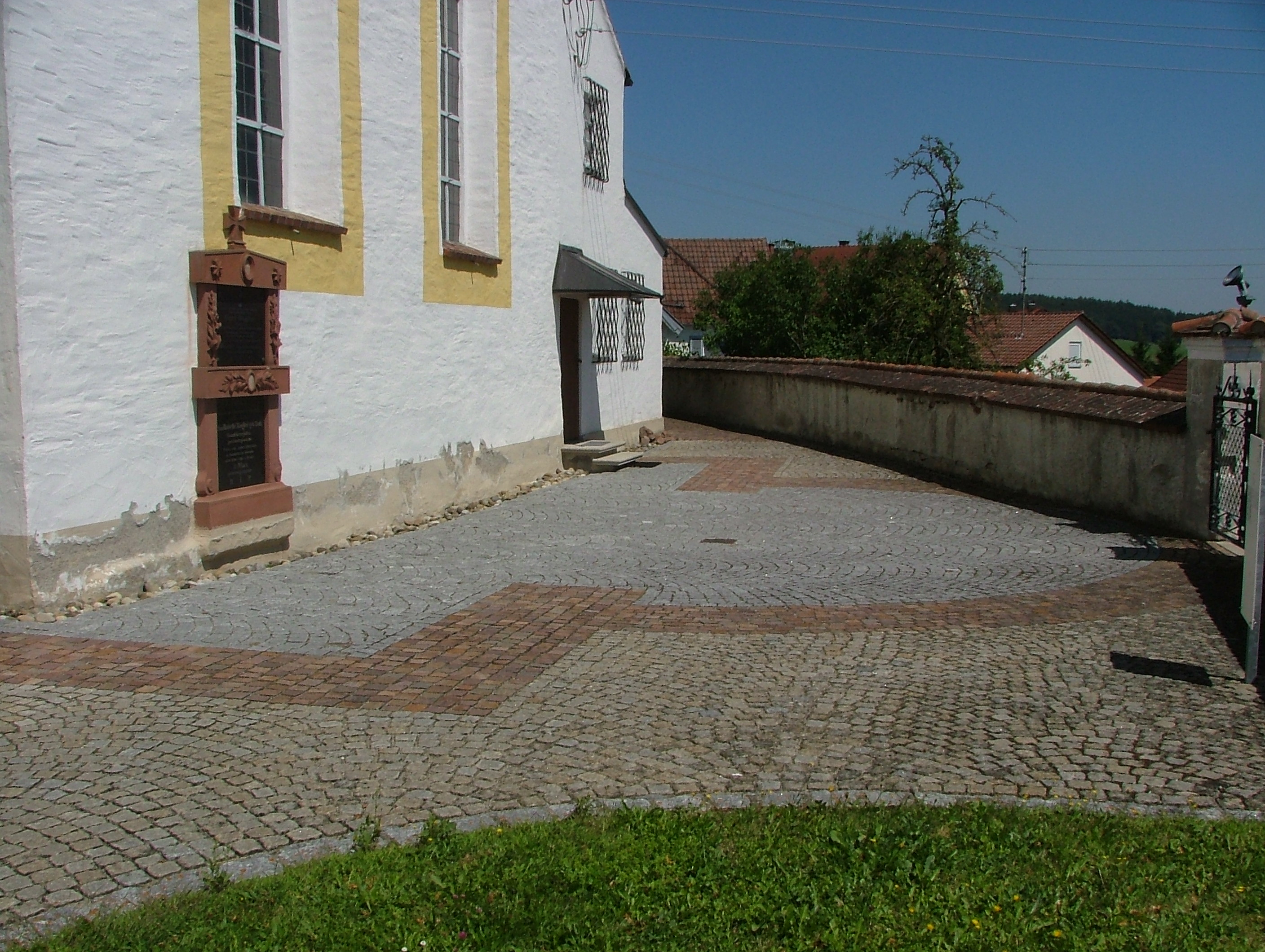 Kellmünz